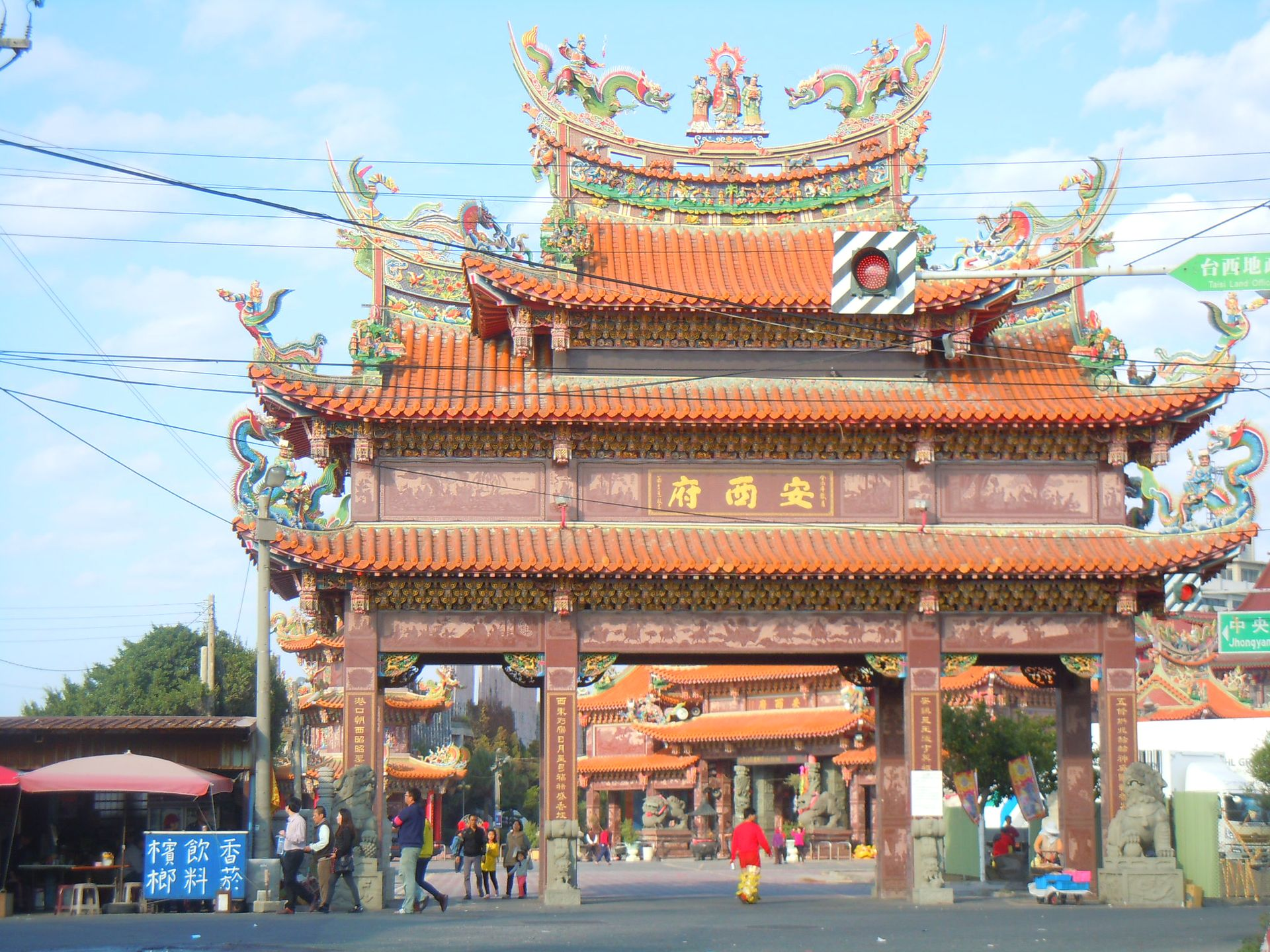 中文（台灣）: 五條港安西府位在雲林縣台西鄉。